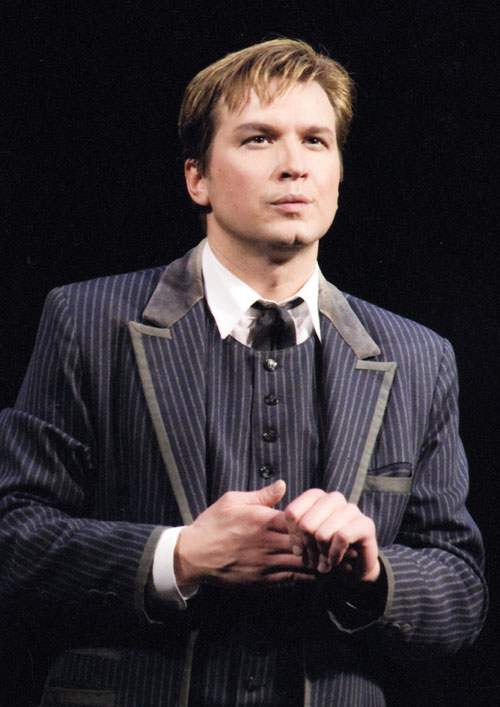 Актёр Александр Вершинин. В роли Глумова в спектакле Малого театра "На всякого мудреца довольно простоты"